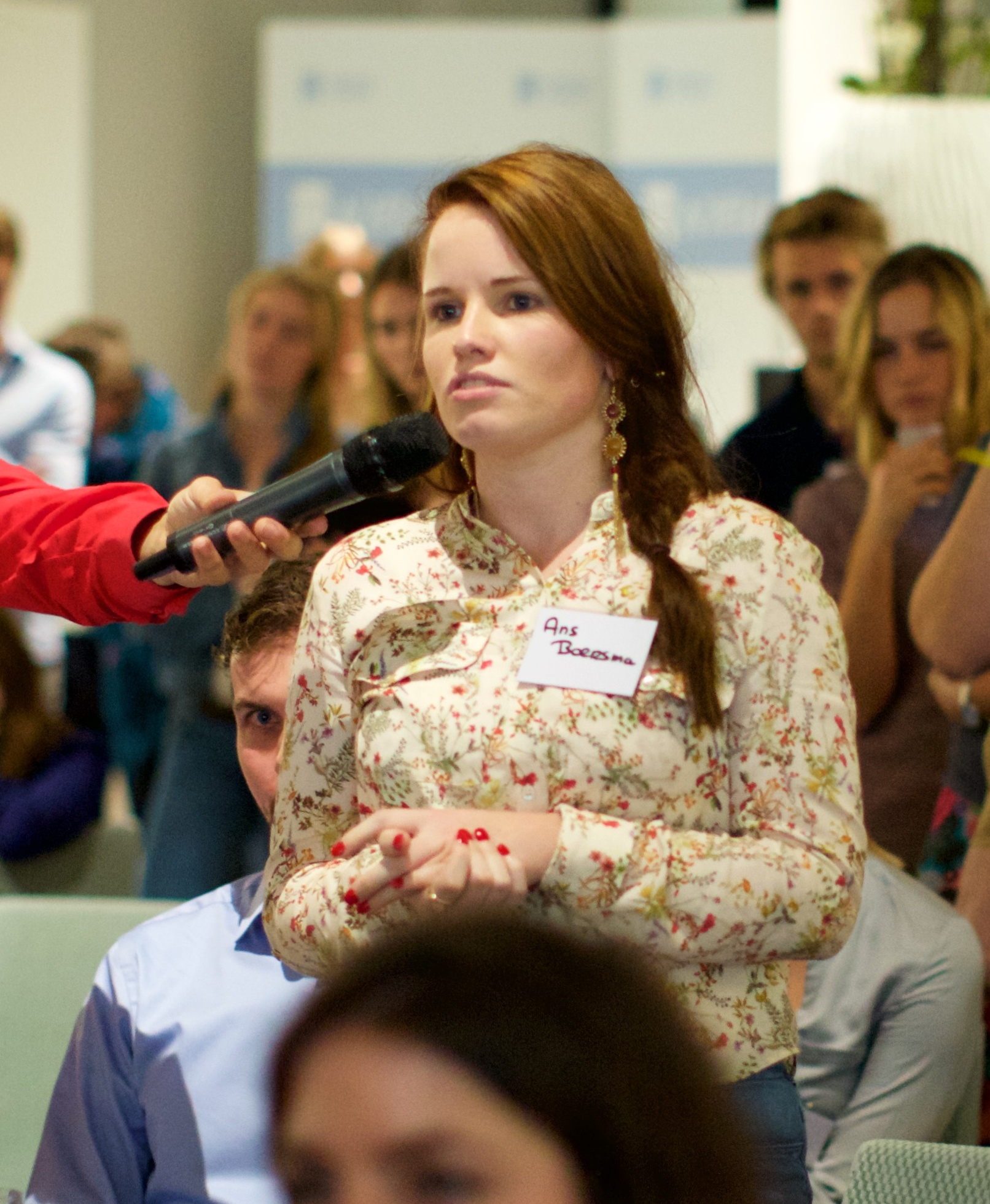 Op zaterdag 26 september vond de negende editie van de jaarlijkse Nacht van de Journalistiek plaats. Dit jaar stond het evenement in het teken van diversiteit in de media. De Nacht van de Journalistiek wordt georganiseerd door ViP, de jongerensectie van de NVJ.